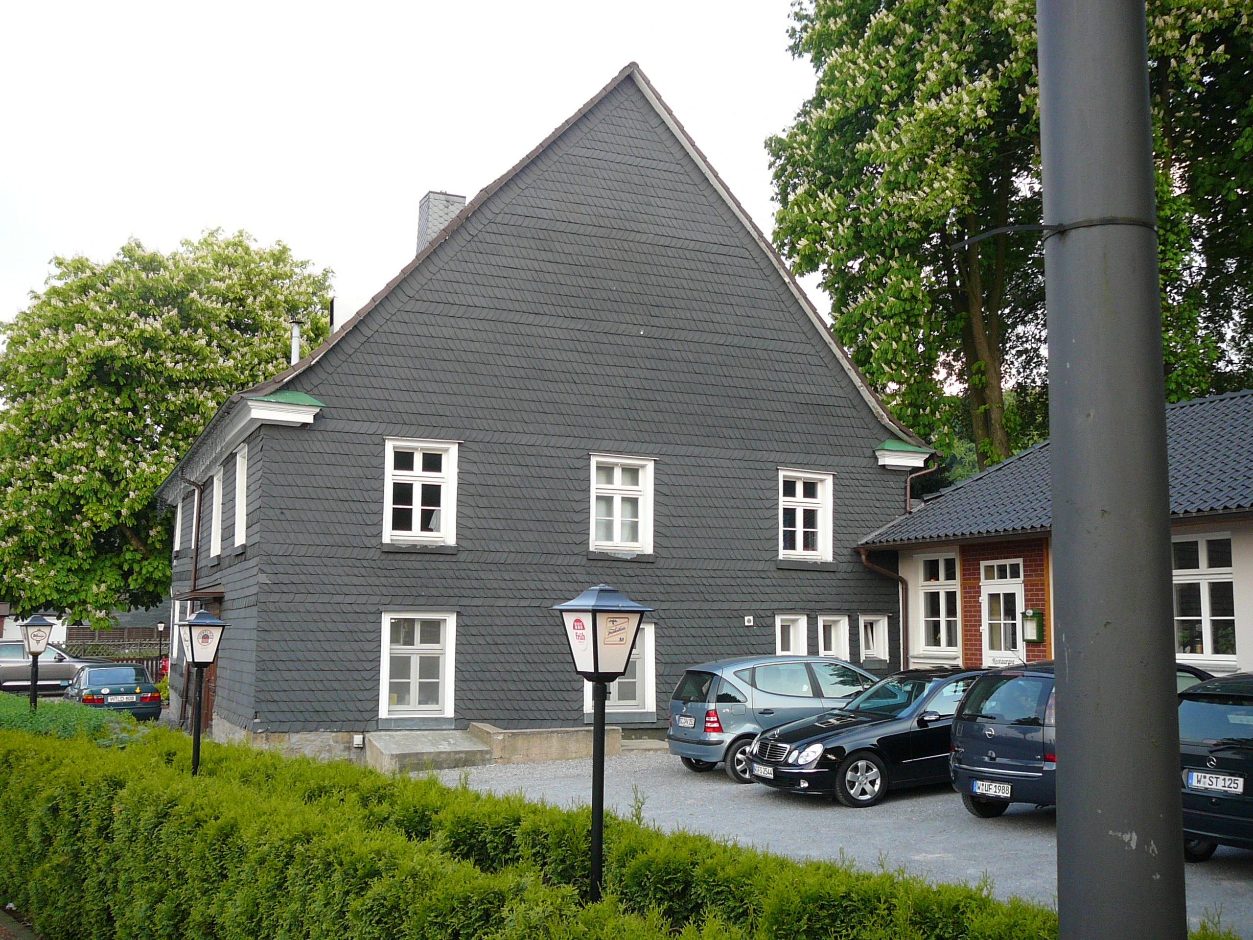 Schwelmer Straße, Wuppertal